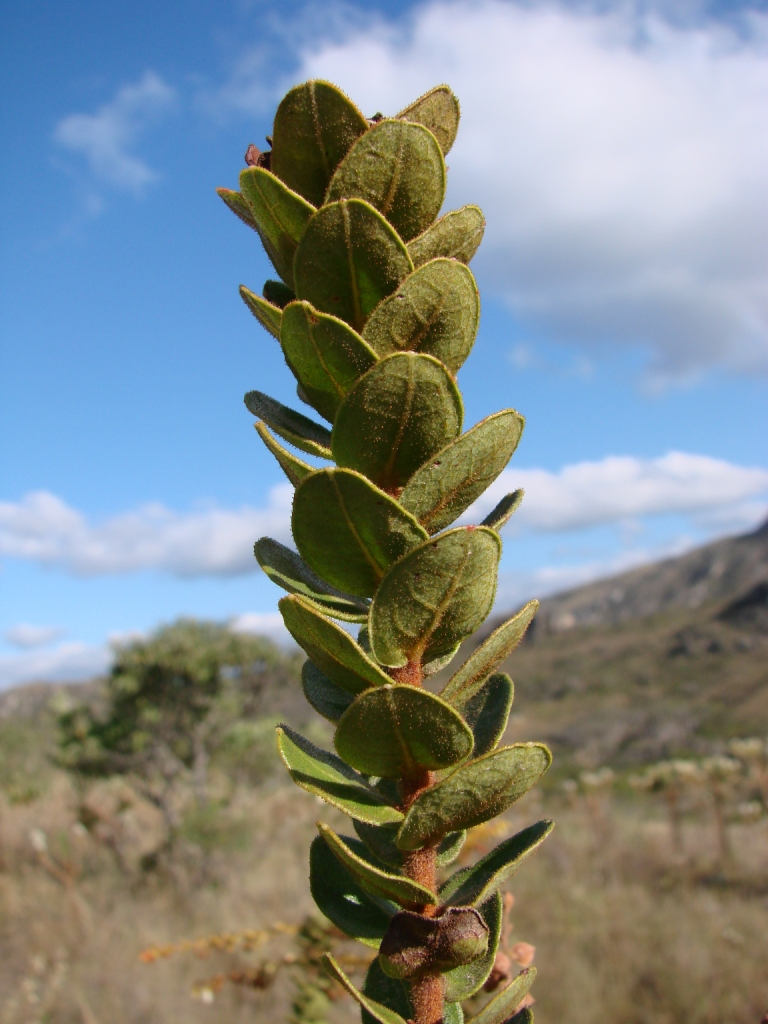 Agarista virgata Judd - ERICACEAE - Espécie endêmica de Minas Gerais - Parque Estadual do Biribiri - Serra do Espinhaço - Diamantina - Minas Gerais - Brasil.